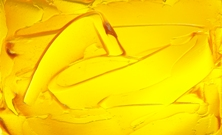 Großaufnahme eines von Klüber Lubrication hergestellten Fettes